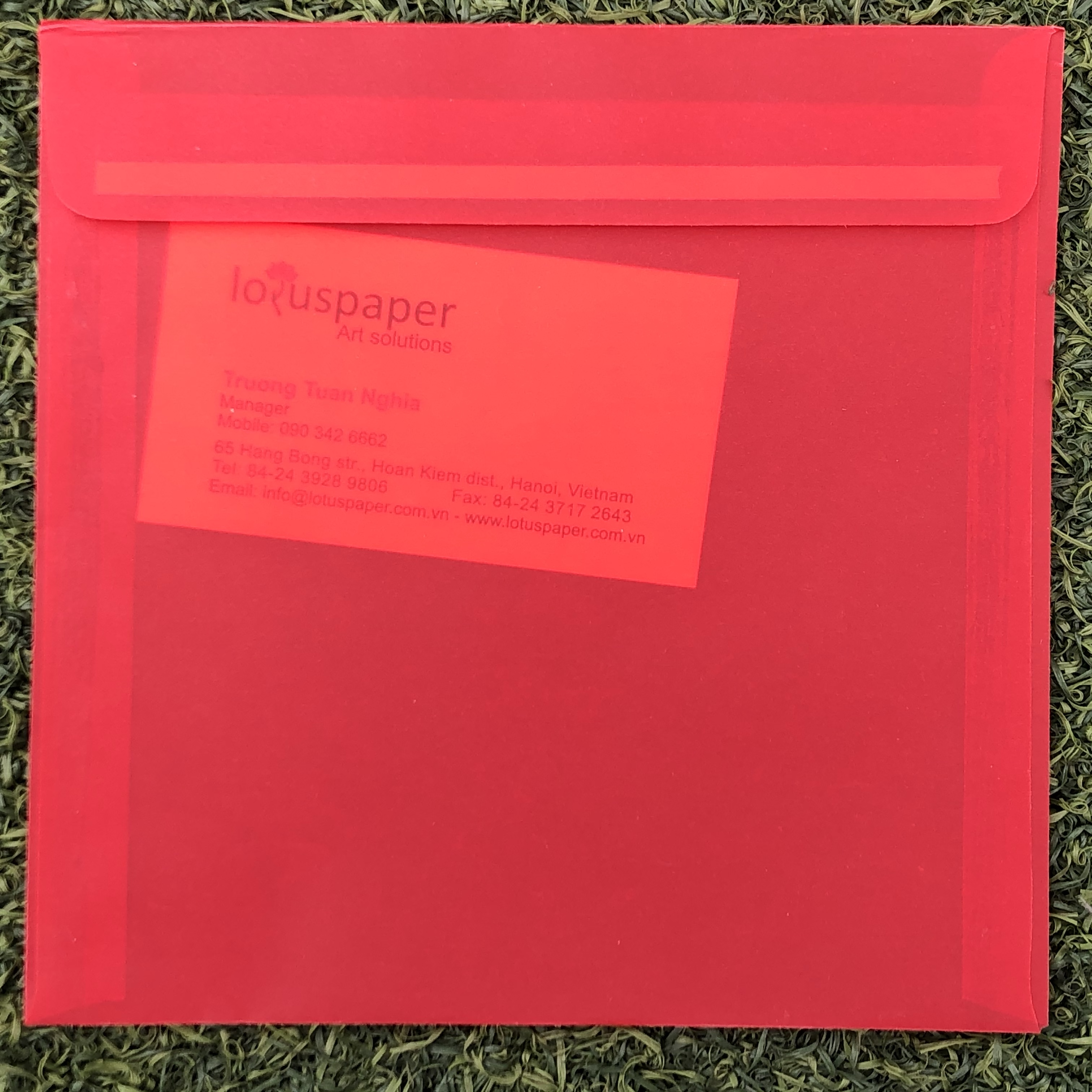 Phong bì giấy can mỹ thuật với băng dính 2 mặt và danh thiếp